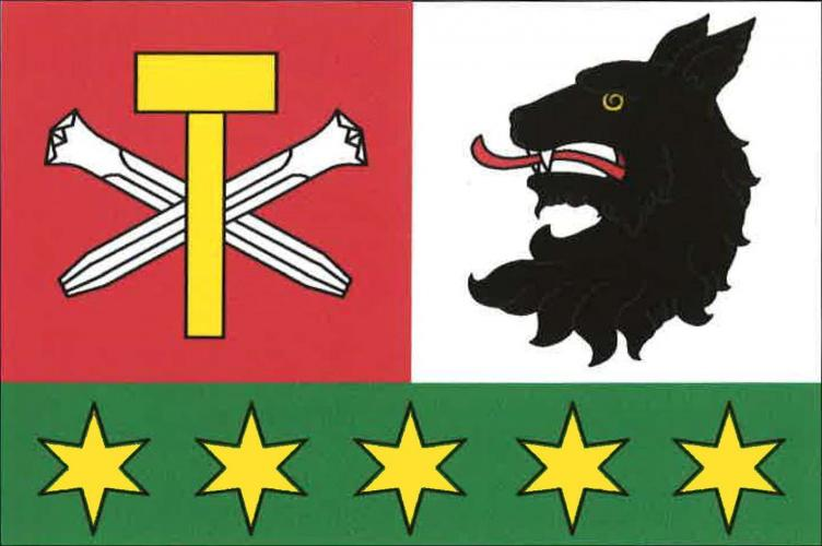 vlajka, Kamenná Lhota, okres Havlíčkův Brod